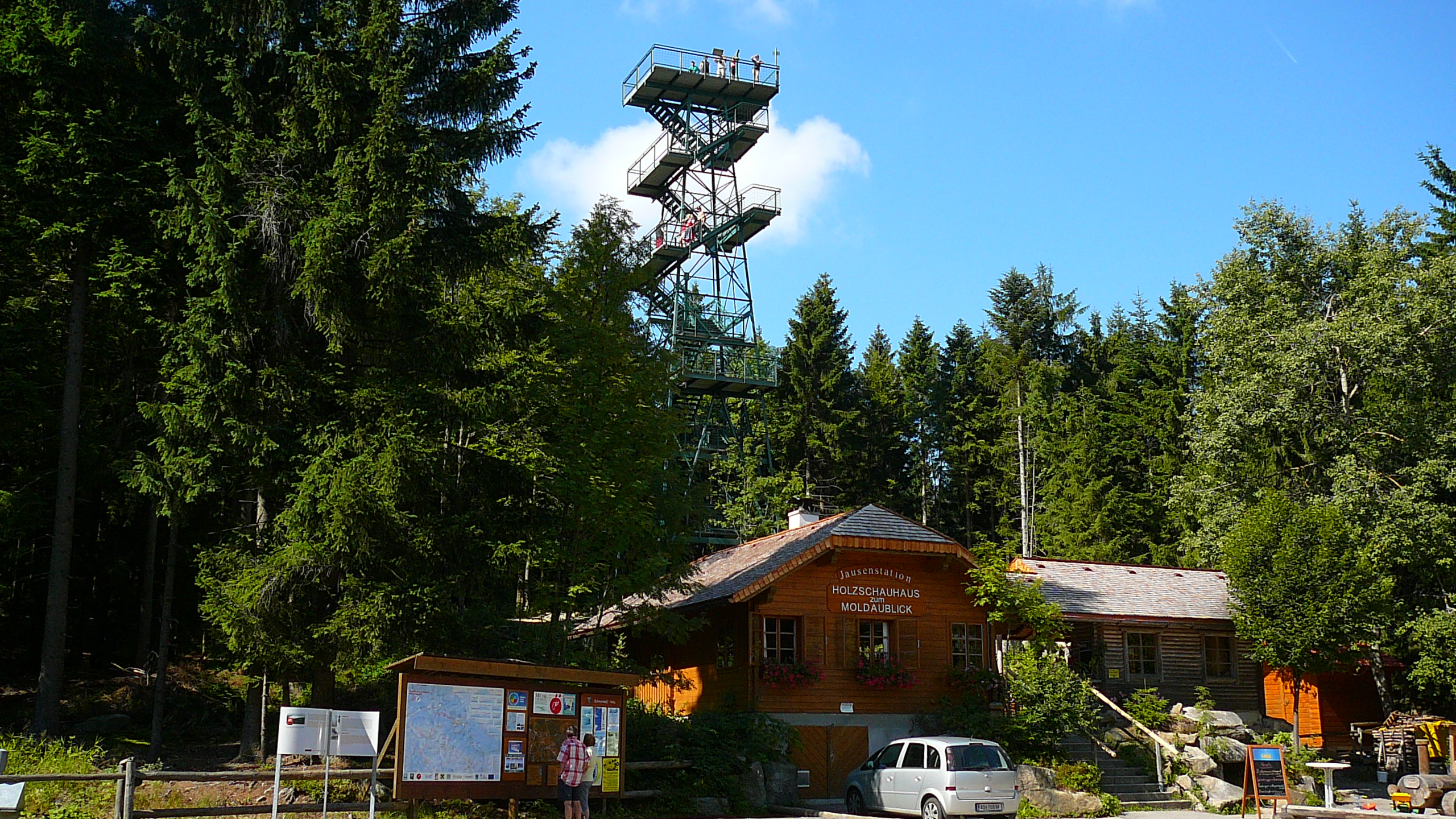 Rozhledna na vrchu Sulzberg z roku 1967